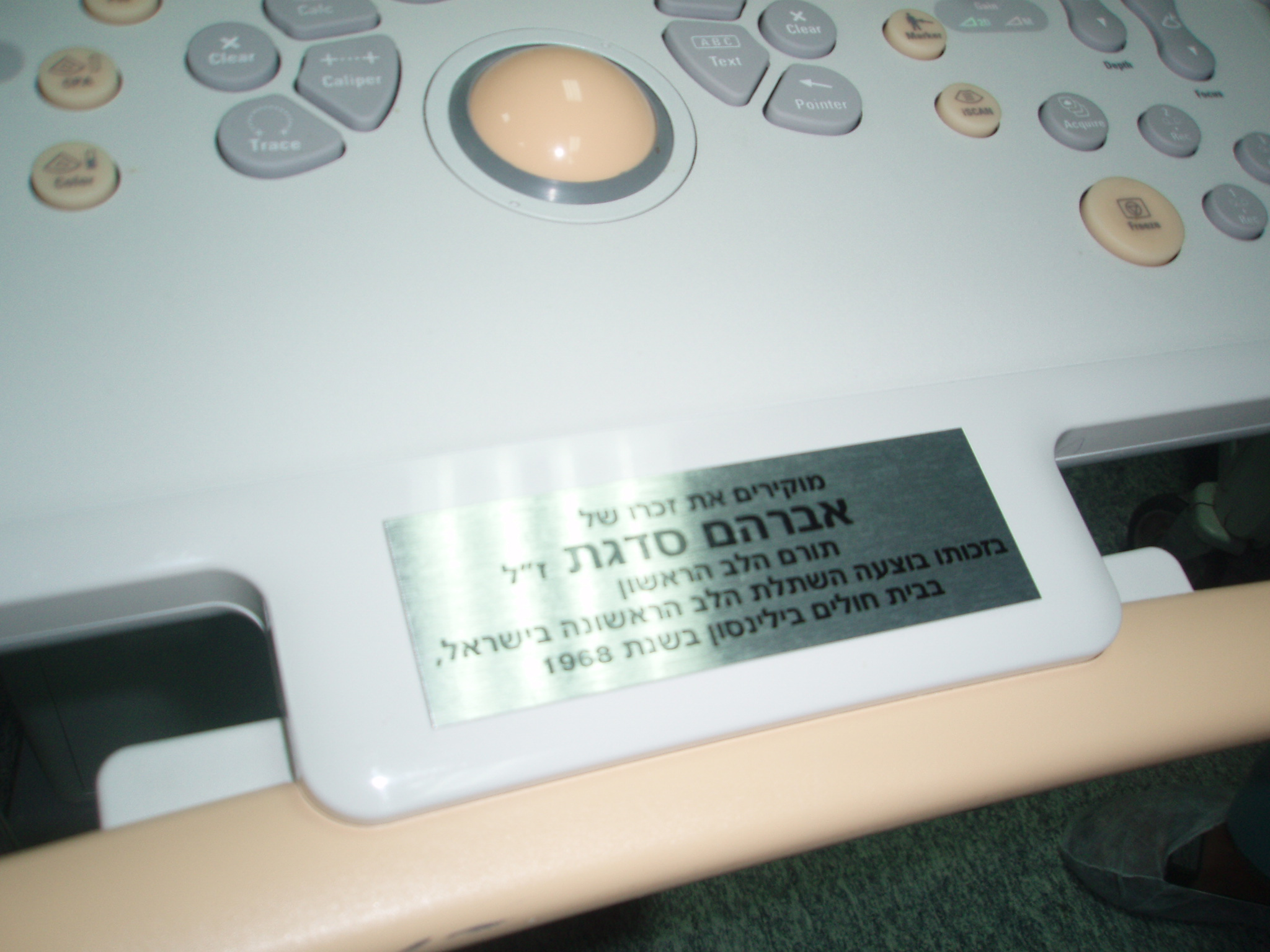 הנצחת אברהם סדגת בבית החולים בלינסון, על גבי מכשיר לבדיקה קרדיולוגית